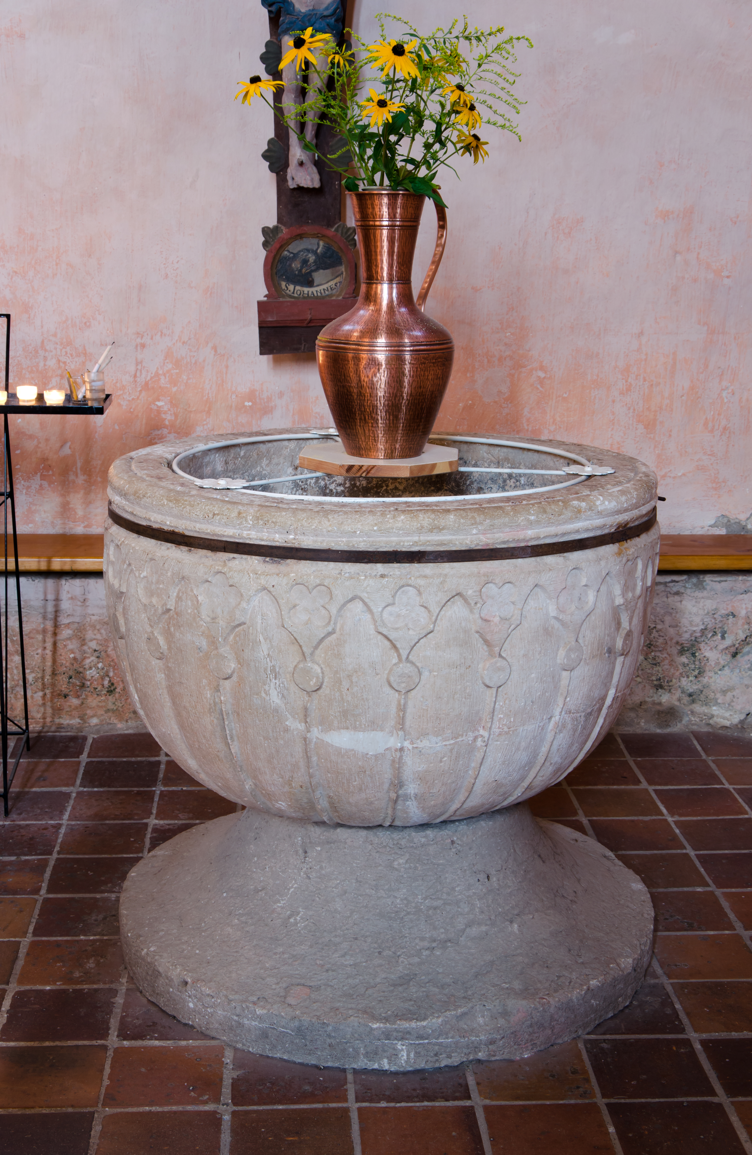 Rerik Kirche Taufstein